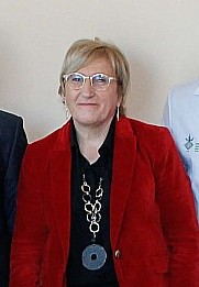 2019 12 12 La Consellera de Sanitat, Ana Barceló, confirma que la reforma i ampliació del Centre de Salut d'Alaquàs s'inclou en el pressupost de la Conselleria